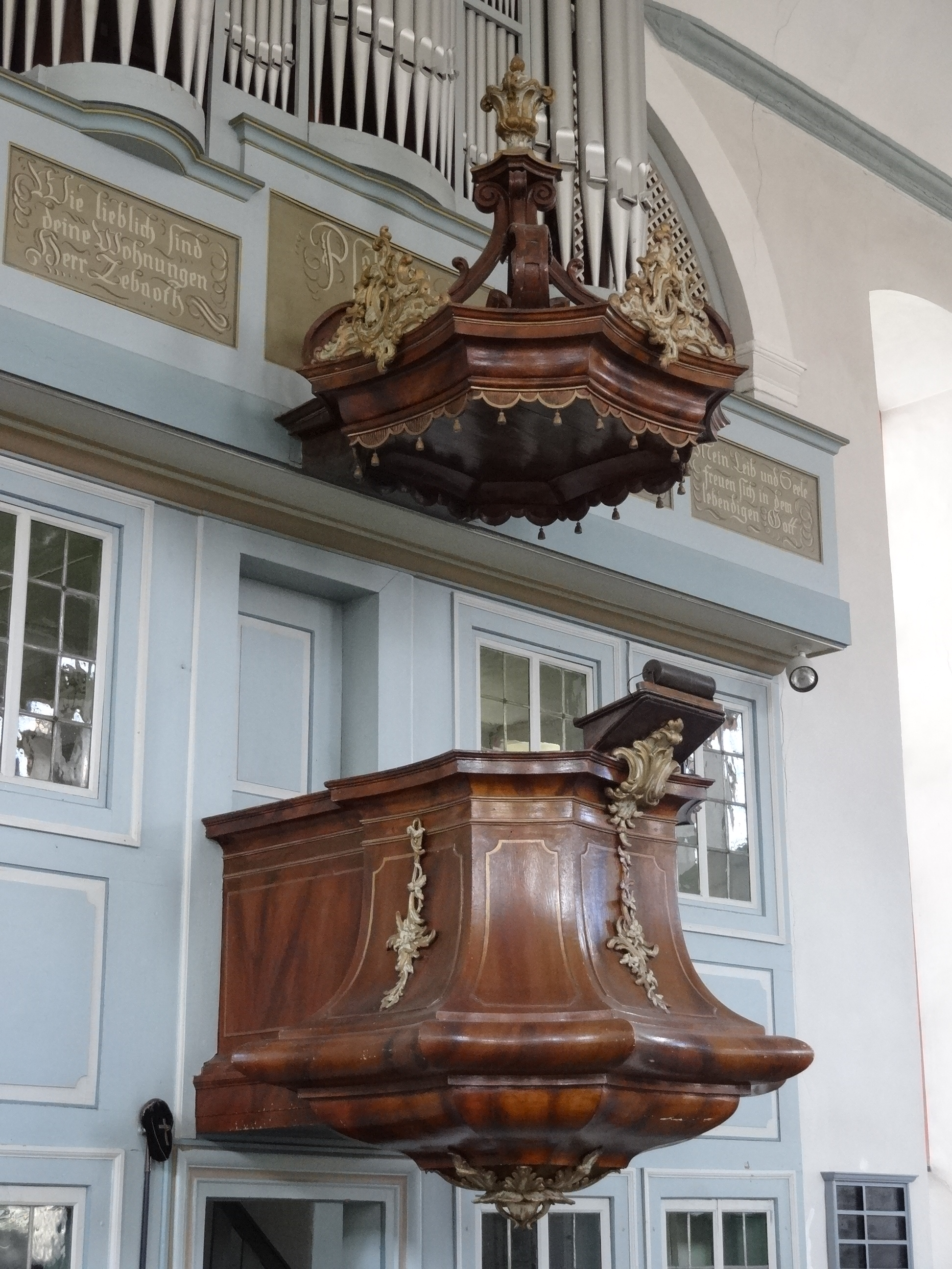 Evangelische Kirche Langsdorf (Lich)